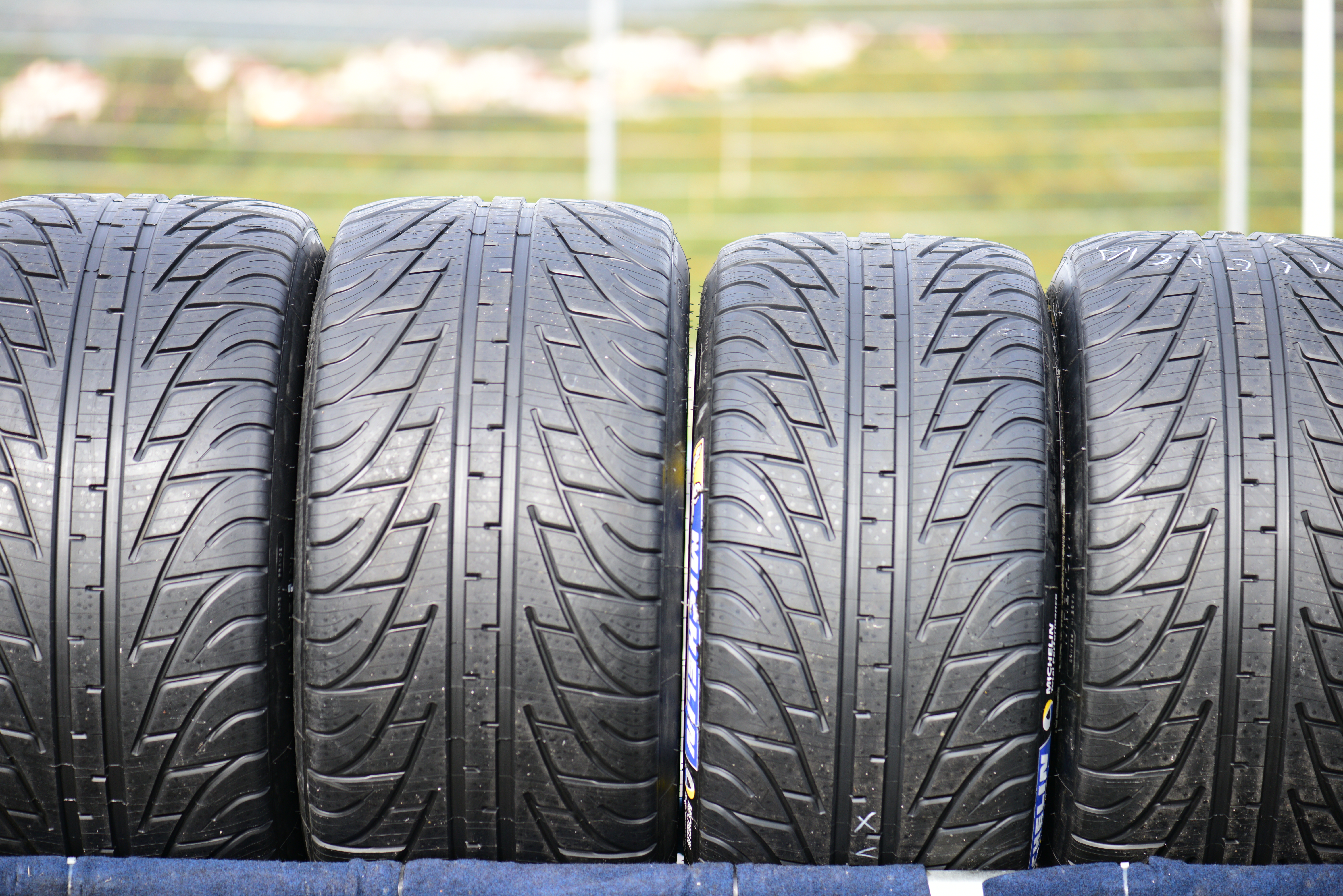 ELMS - 2016 - 4 Horas Estoril - Portugal